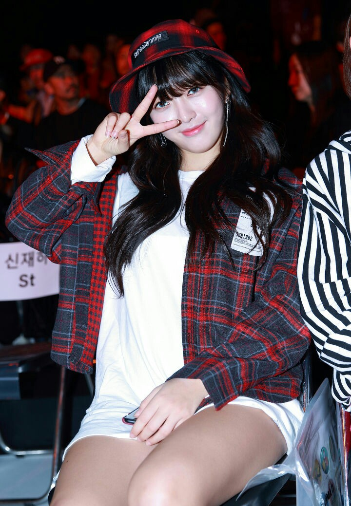 171017 AOA 찬미 패션위크 슈퍼콤마비